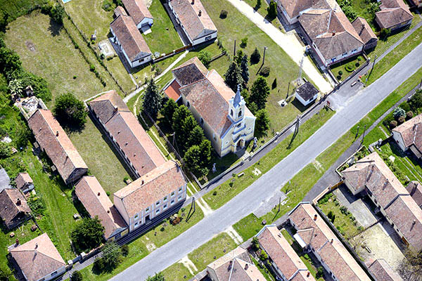 Várkesző